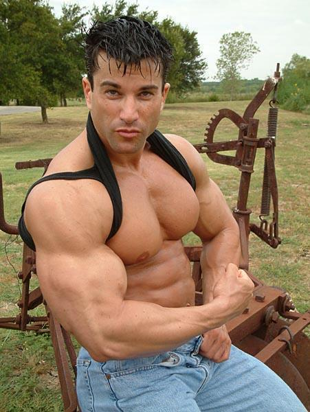 La Fondinto Israeli-born bodybuilder and model Sagi Kalev